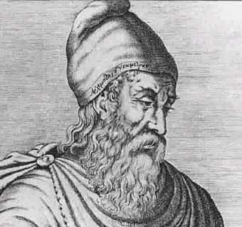 Archimedes